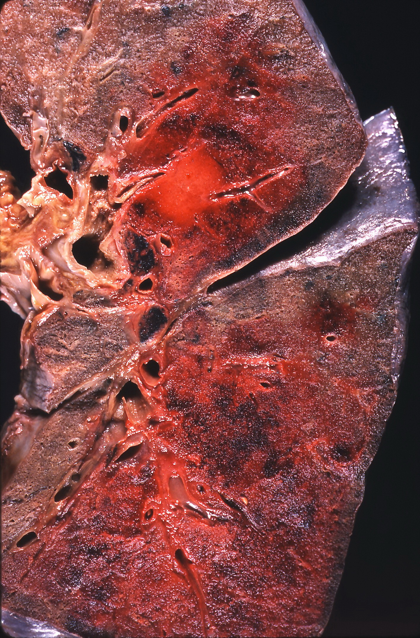 Kaposi sarcoma